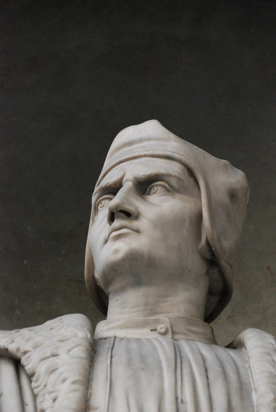 Ritratto della statua di Francesco Gucciardini agli Uffizi